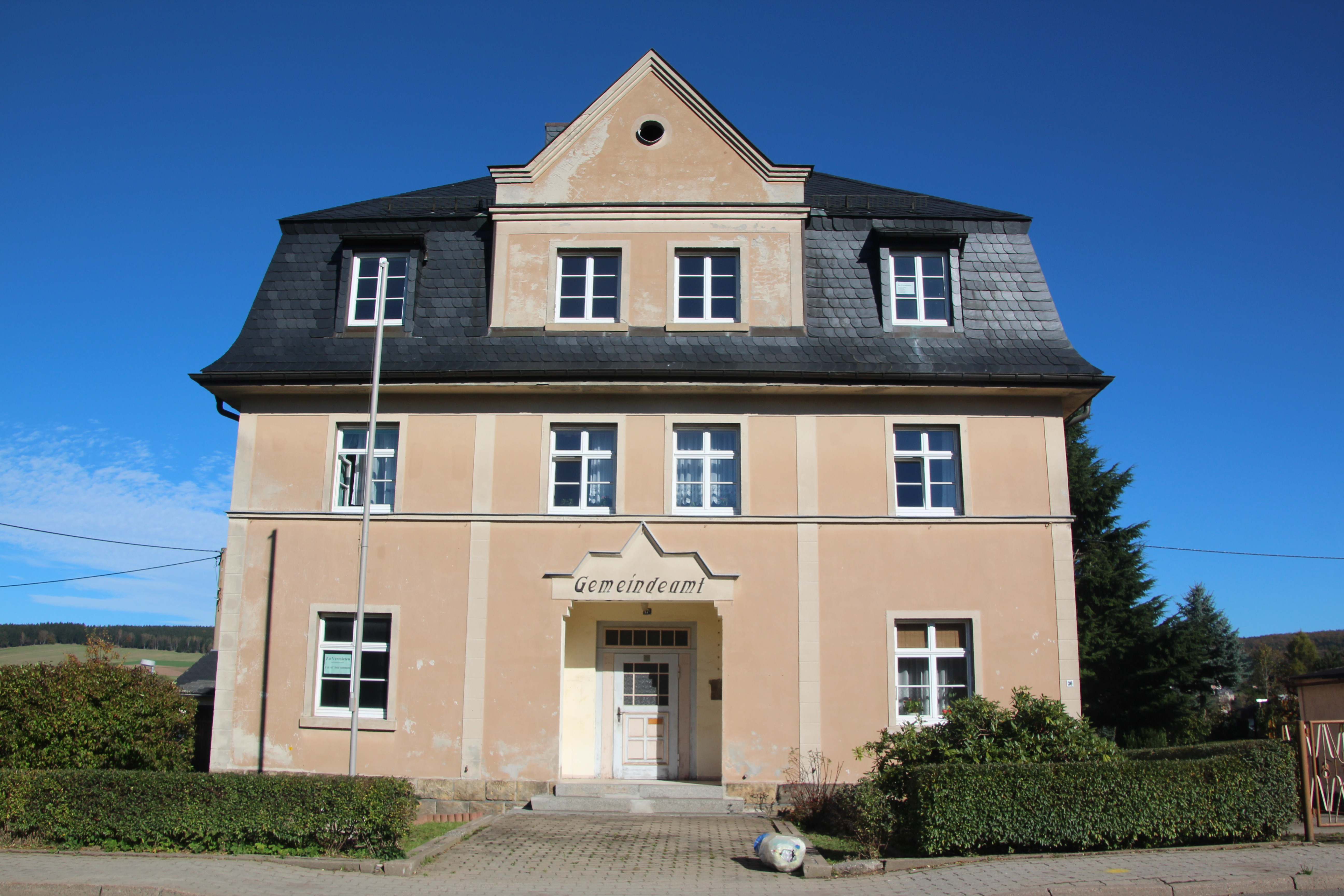 Gemeindeamt Blumenau in Blumenau, einem Ortsteil der sächsischen Stadt Olbernhau im Erzgebirgskreis, im Oktober 2014.